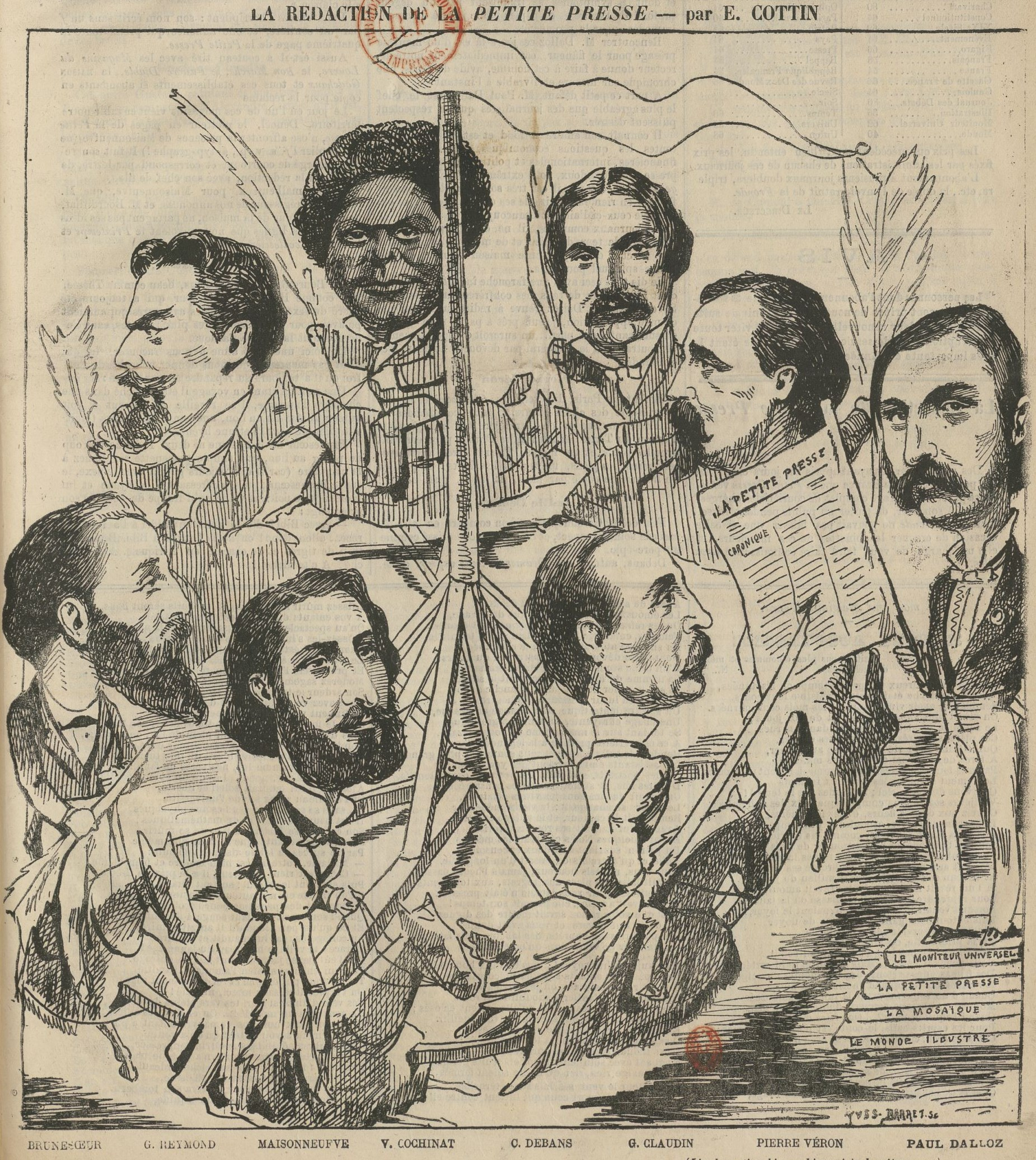 "La rédaction de la Petite Presse - par E. Cottin".